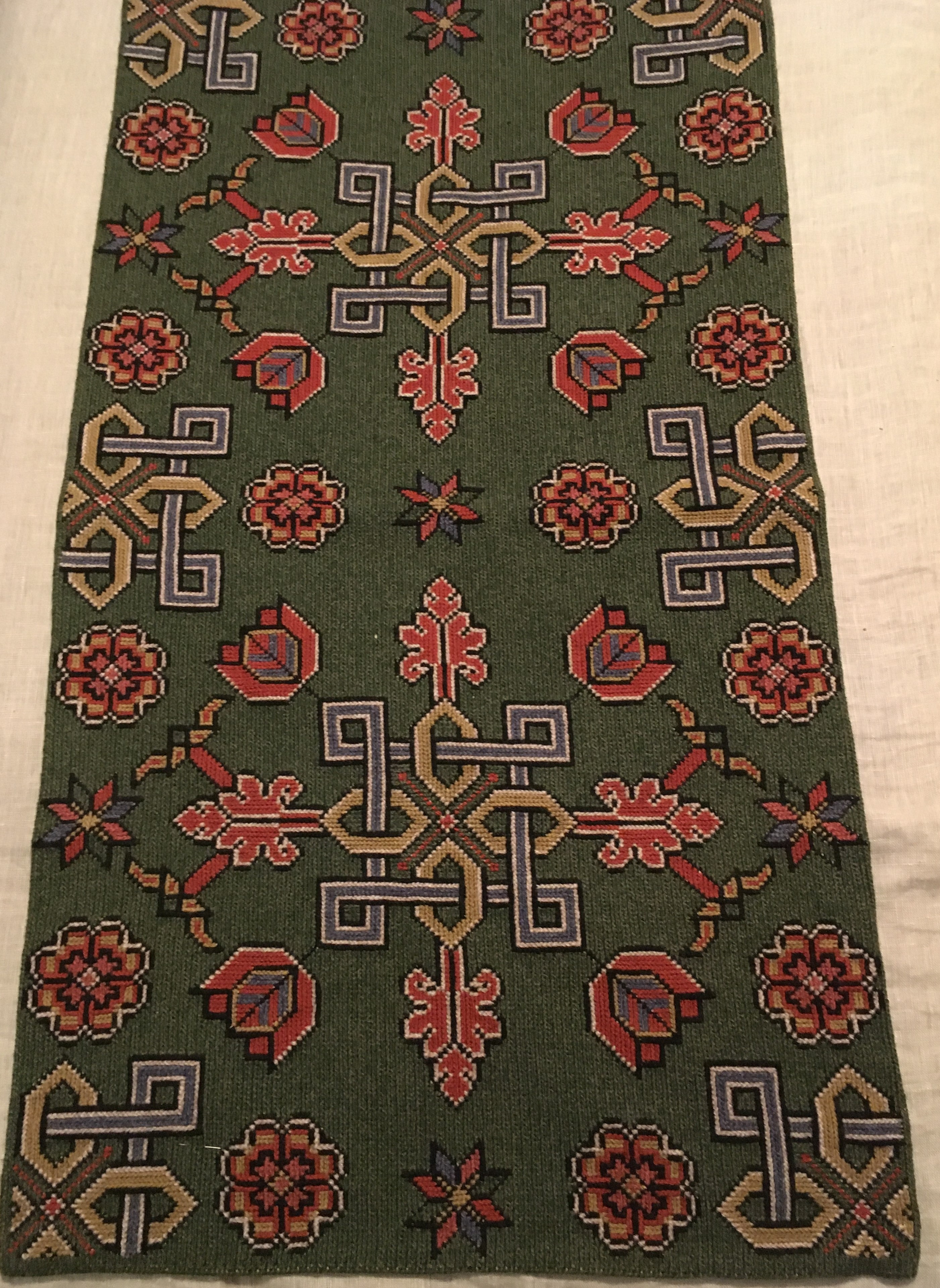 tvistsöm